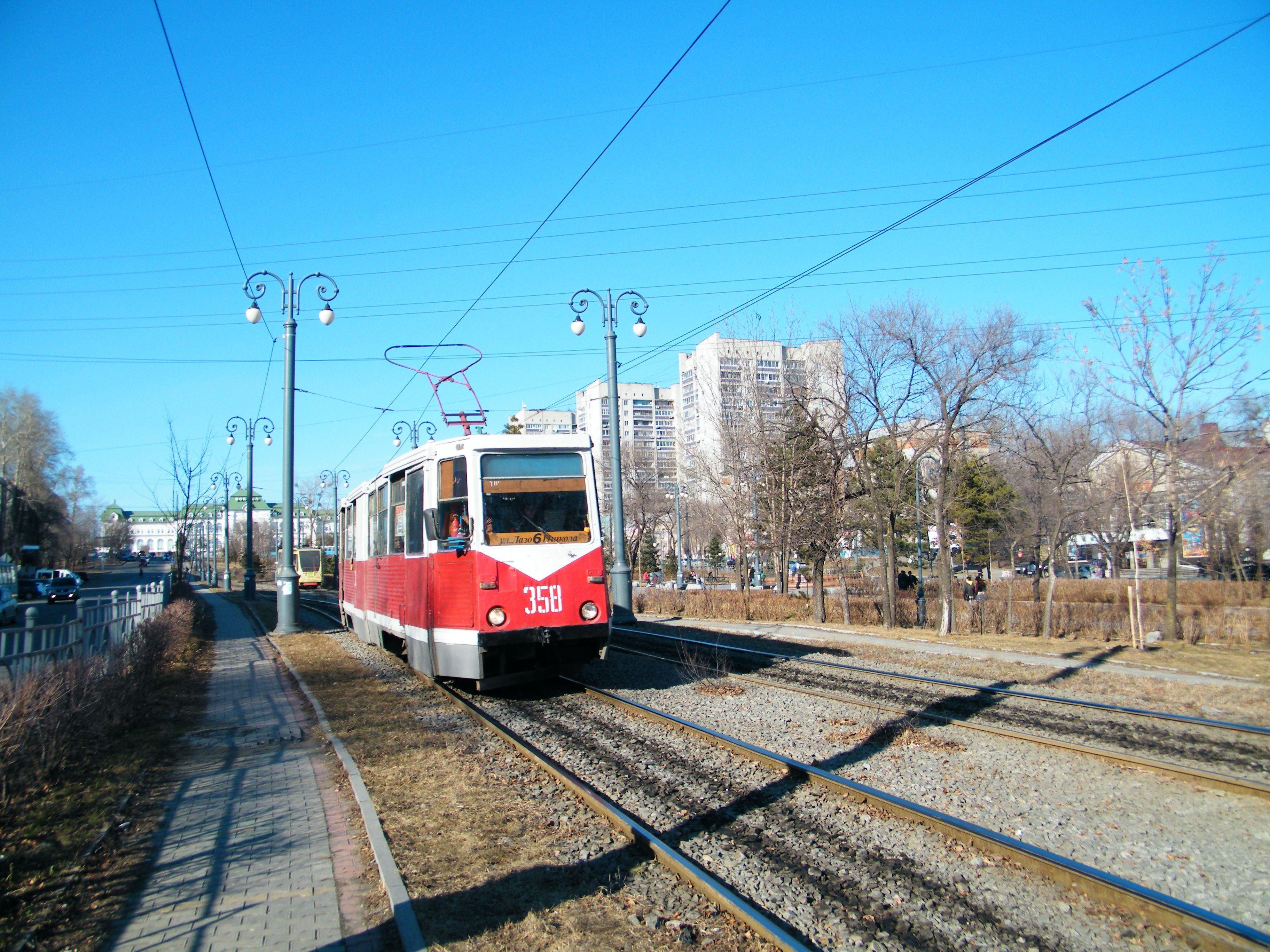 KTM-5 in Khabarovsk